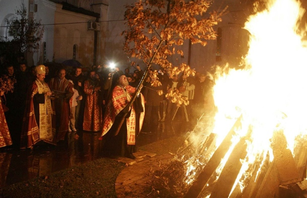 Nalaganje badnjaka u porti Hrama Svetog Save u Beogradu